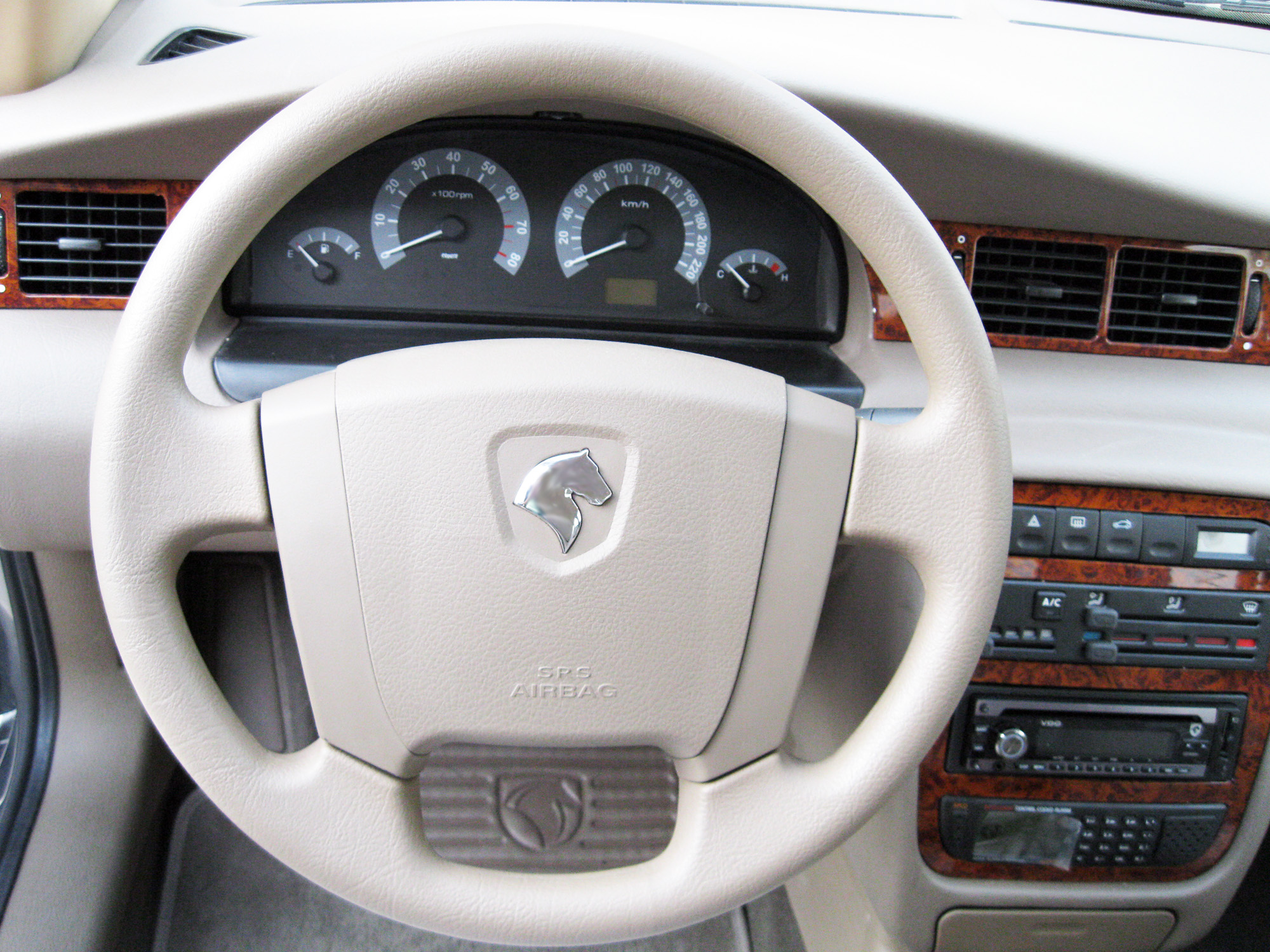 فرمان سمند ال ایکس با کیسه هوا